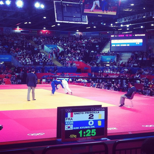 Judo